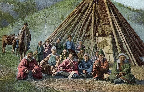 Altáis